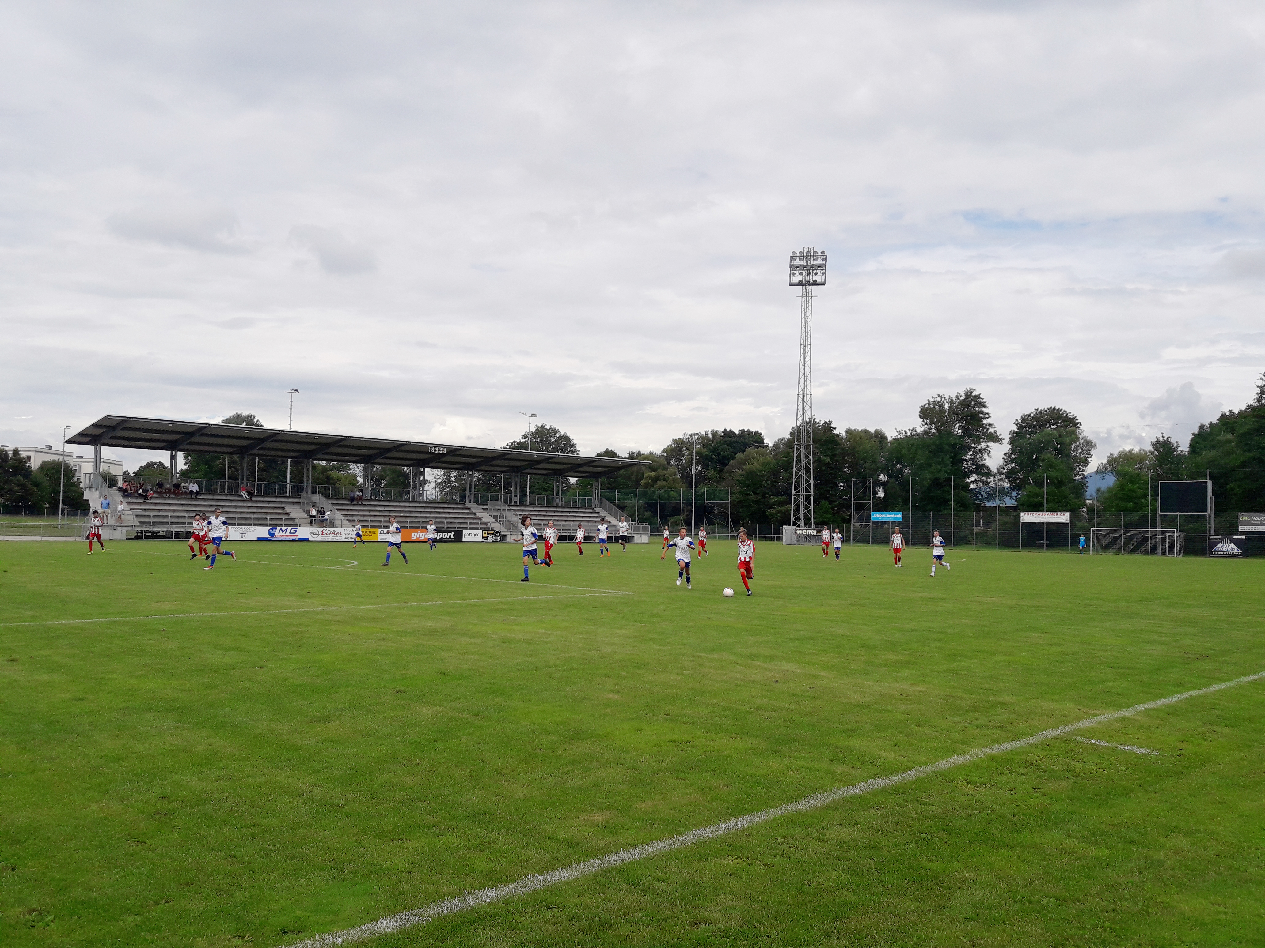 Hauptspielfeld mit Tribüne und Flutlichtanlage